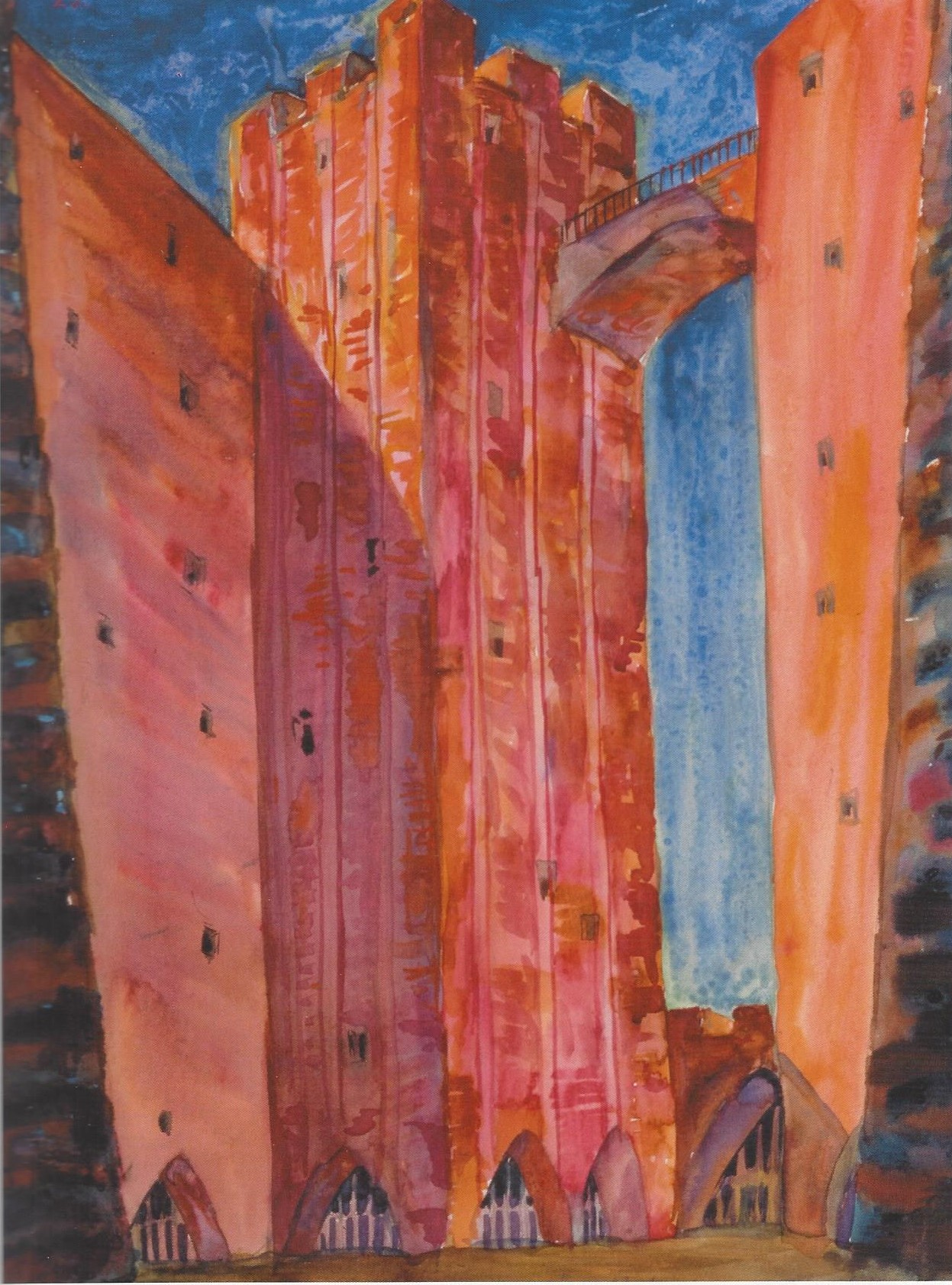 Bühnenbild für Fidelio